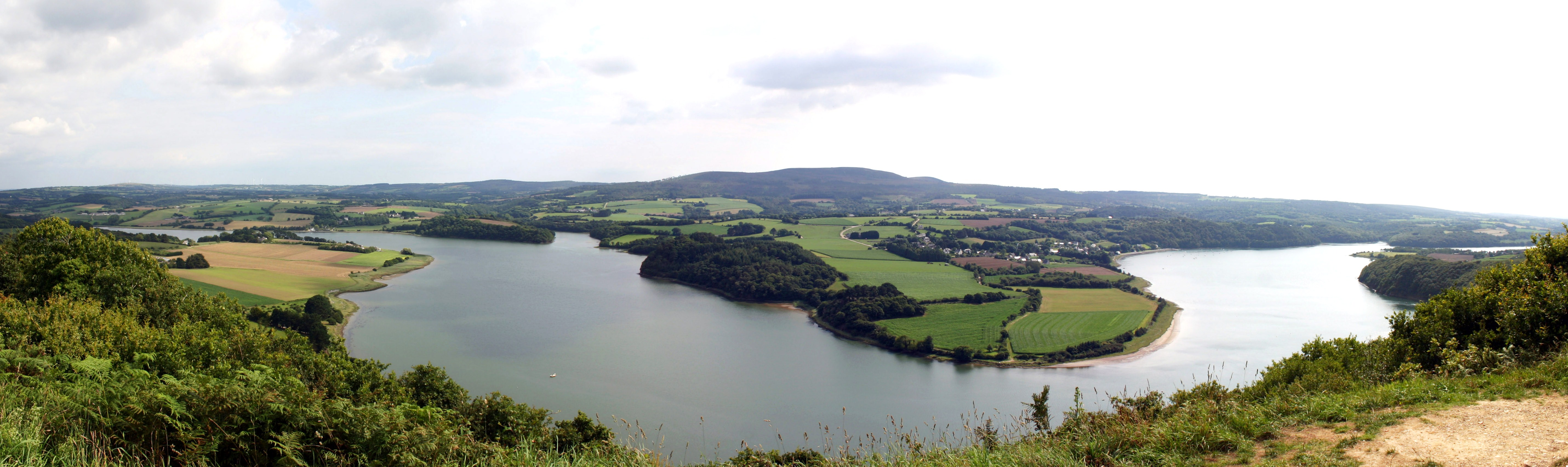 L'Aulne et les méandres de Trégarvan-Belvédère de Rosnoën-Finistère-France